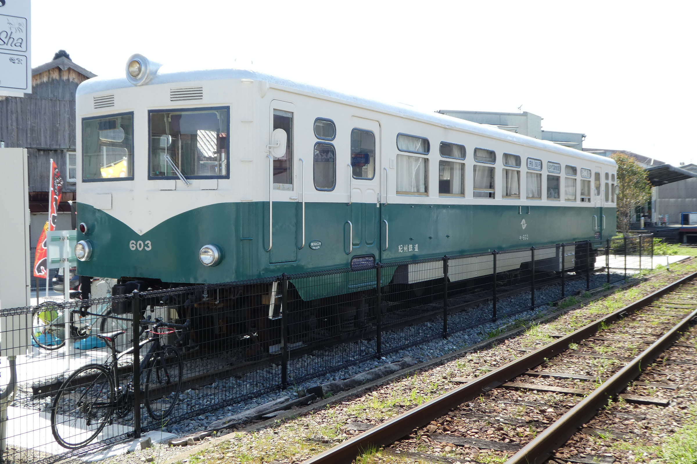 御坊市の「ほんまち広場603」に静態保存されている紀州鉄道キハ603